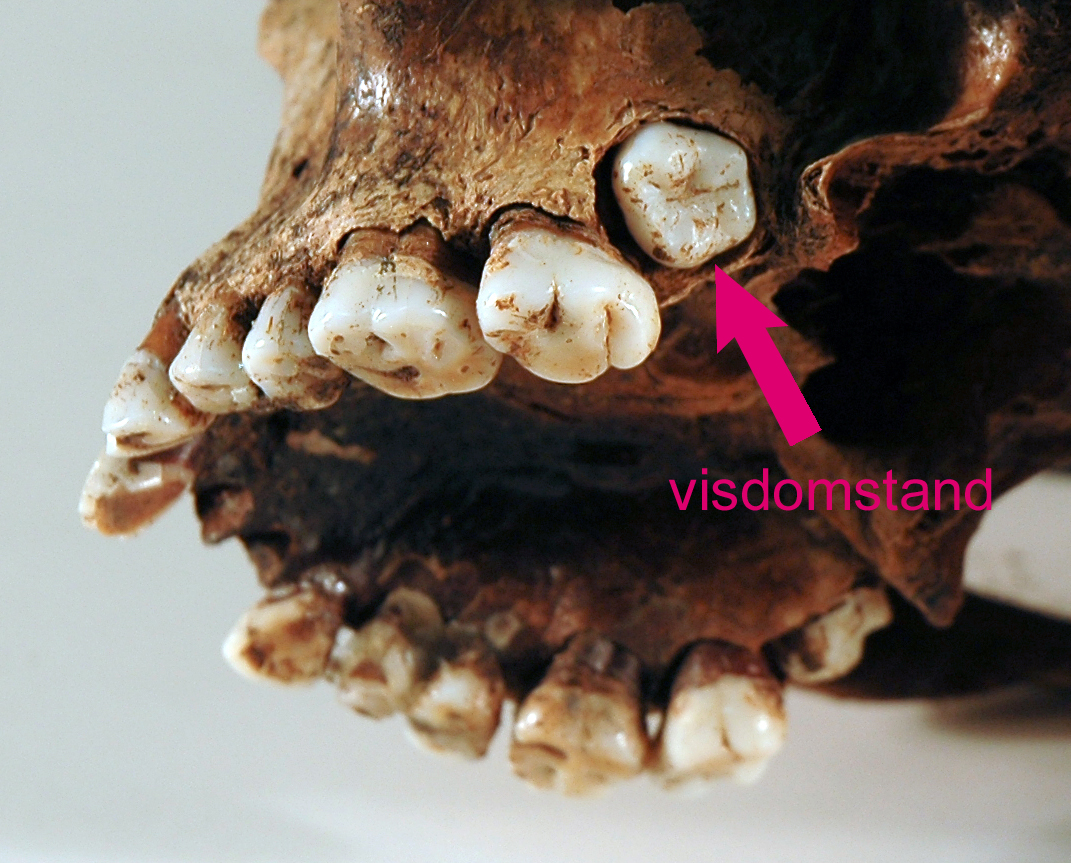 Utställningsbild från den arkeologiska utställningen Hallonflickan sommaren 2011 på Falbygdens museum i Falköping. Bilden visar Hallonflickans tänder i överkäken och att hennes visdomständer ännu inte växt ut, vilket kan användas vid åldersbestämning. Hallonflickan är ett 5000 år gammalt skelett som hittades 1943 i en mosse utanför Falköping, Västergötland, Sverige. Den uppladdade filen är originalfilen, som den utställda bilden skrevs ut från.